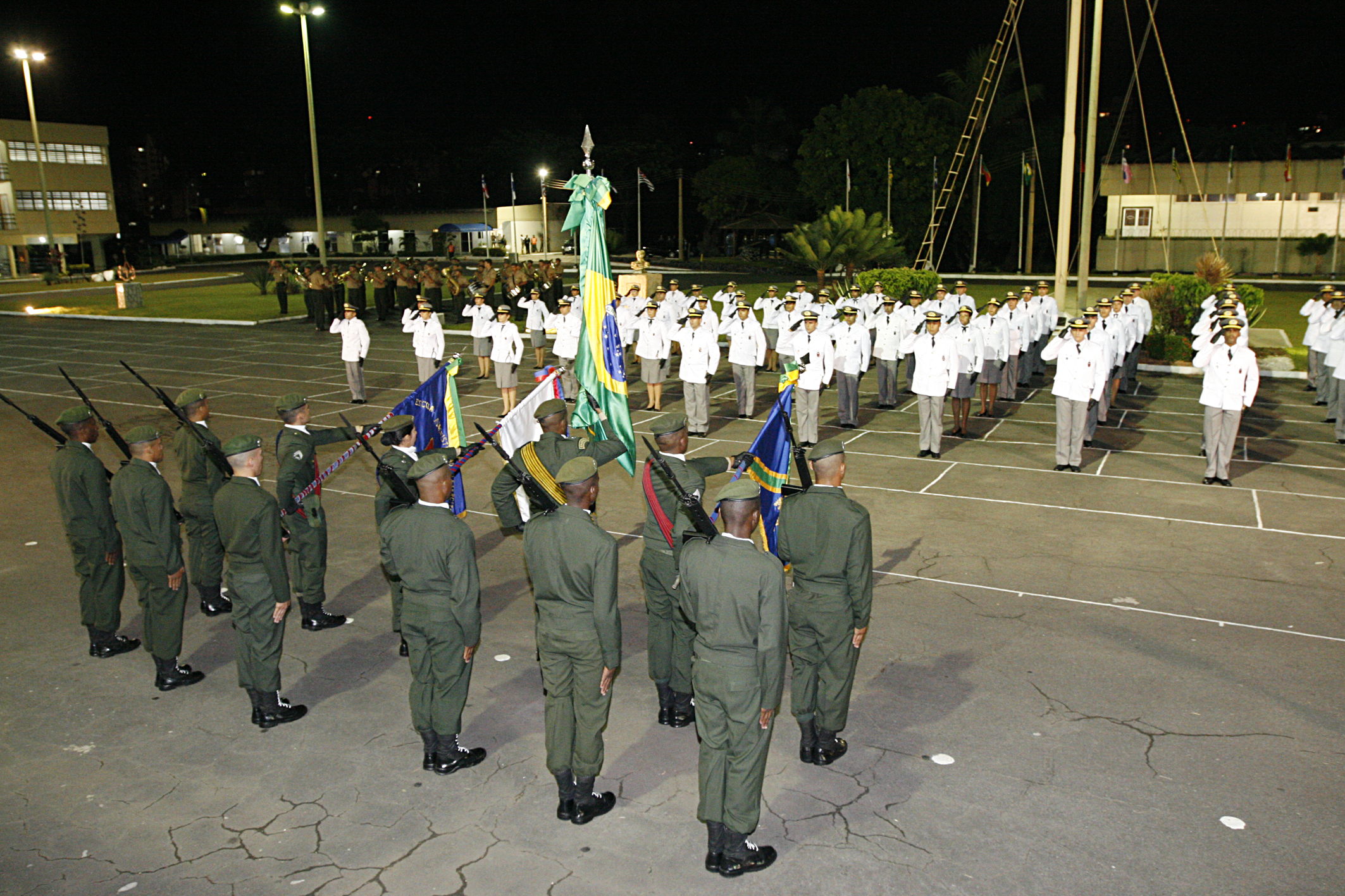 Solenidade de formatura do curso de formação de oficiais do quadro complementar 2009 da Escola de Administração do Exército. Turma Marechal Deodoro da Fonseca.